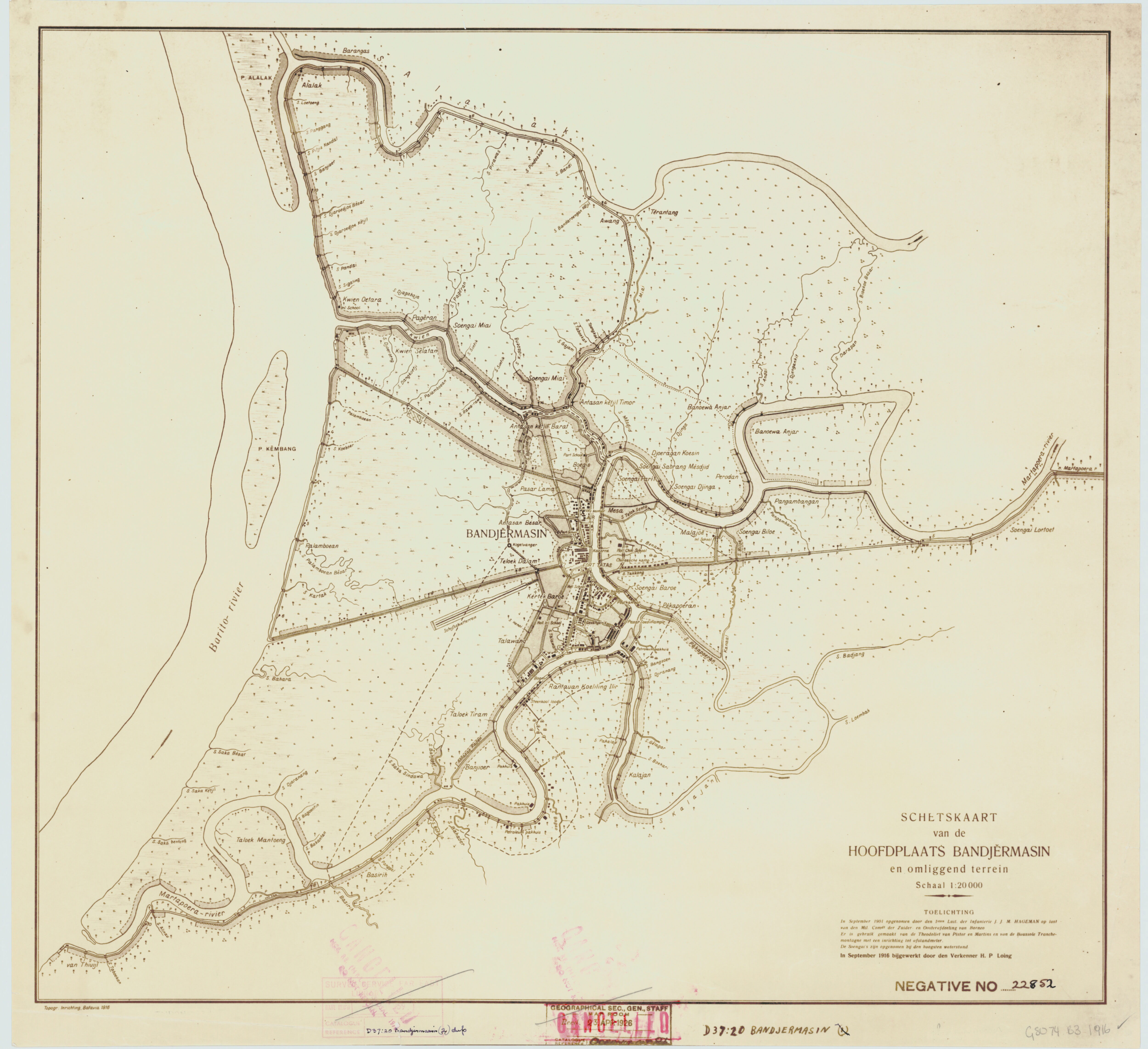 Sketsa peta Kota Banjarmasin dan sekitarnya